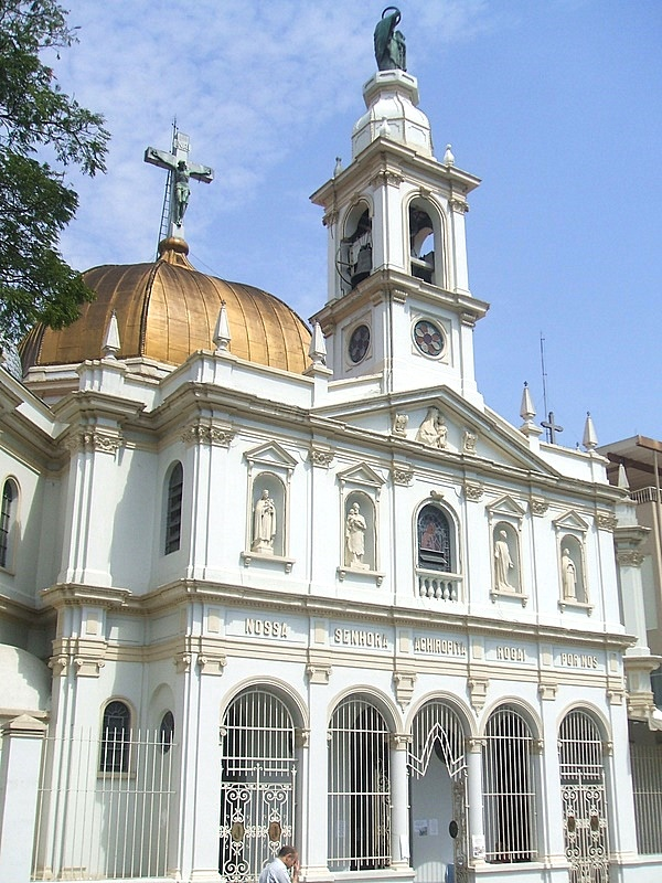 Igreja de Nossa Senhora Achiropita, em São Paulo, Brasil